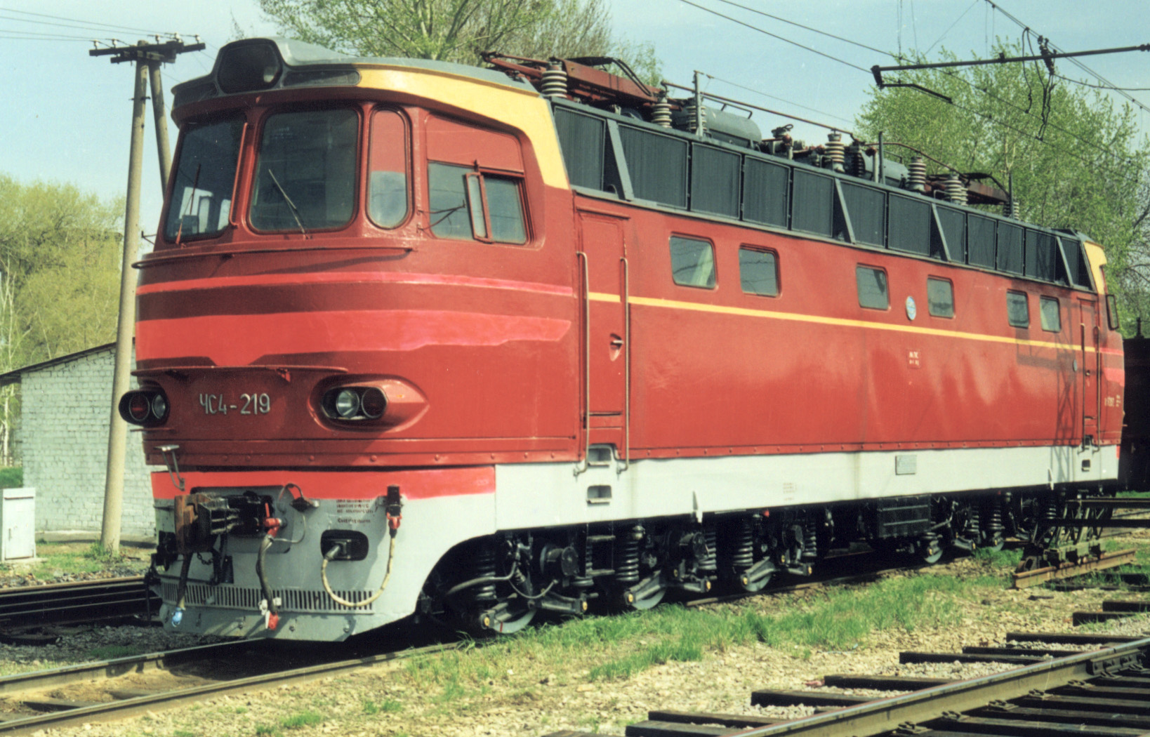 Электровоз ЧС4-219